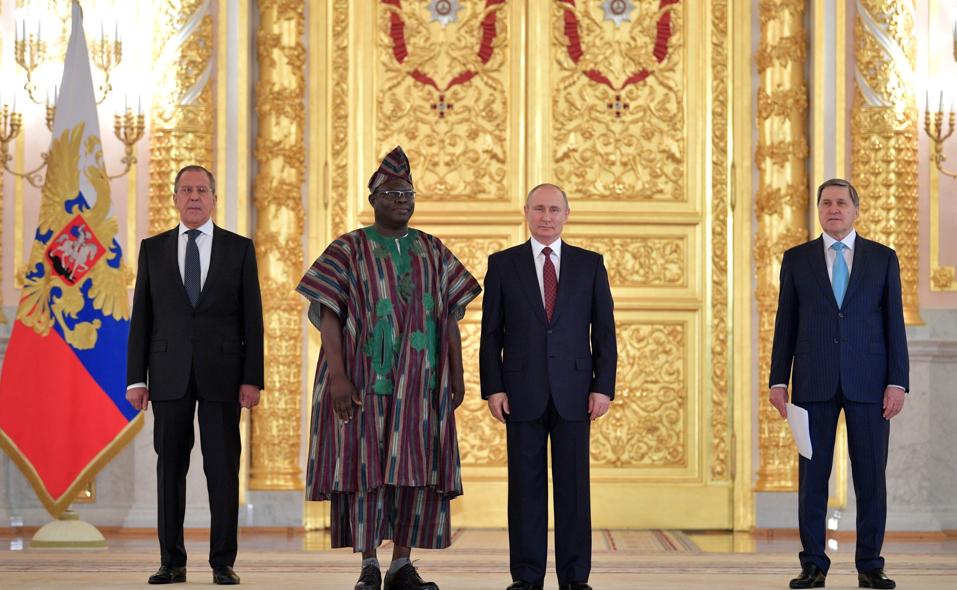 В Александровском зале Большого Кремлёвского дворца Владимир Путин принял верительные грамоты у послов ряда иностранных государств. На церемонии вручения верительных грамот. С Чрезвычайным и Полномочным Послом Республики Бенин в Российской Федерации Нукпо Клеманом Кики.